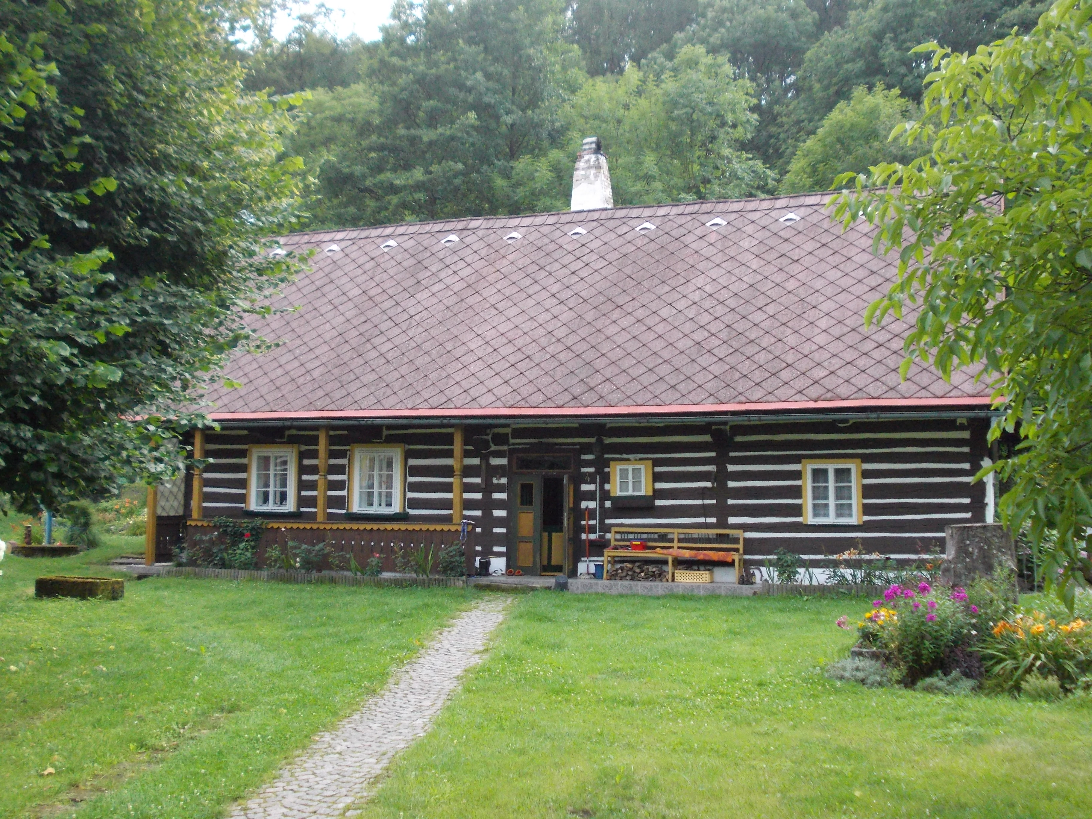 Březka - dům č.p. 3